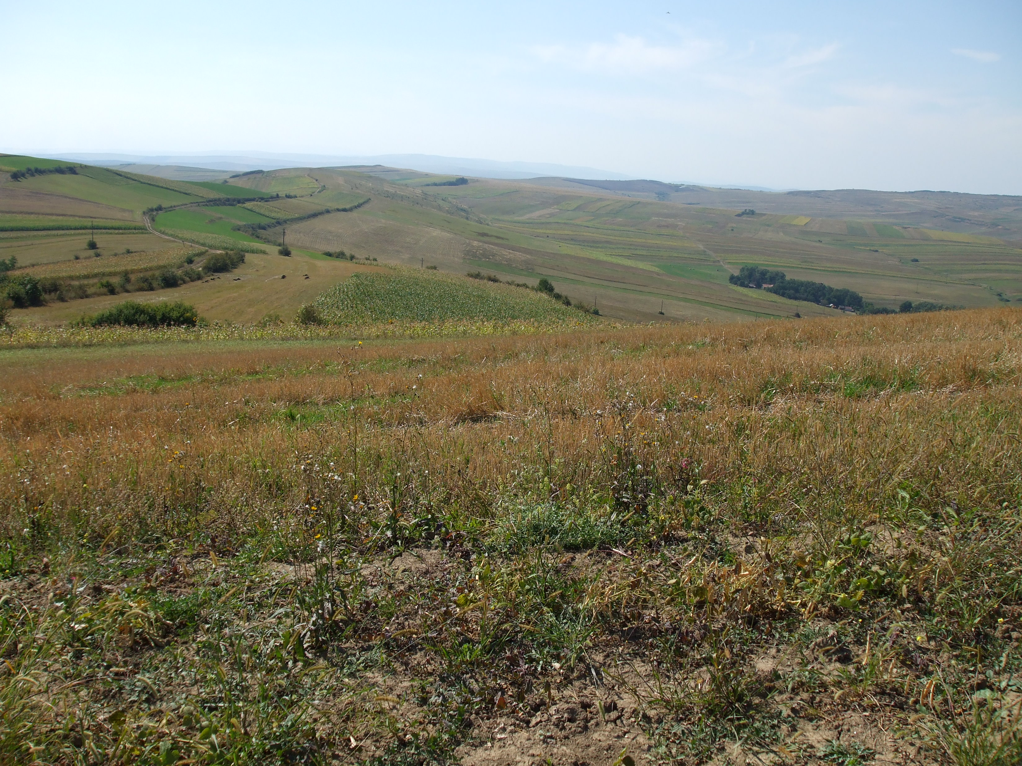 Imagini din Aruncuta,Cluj